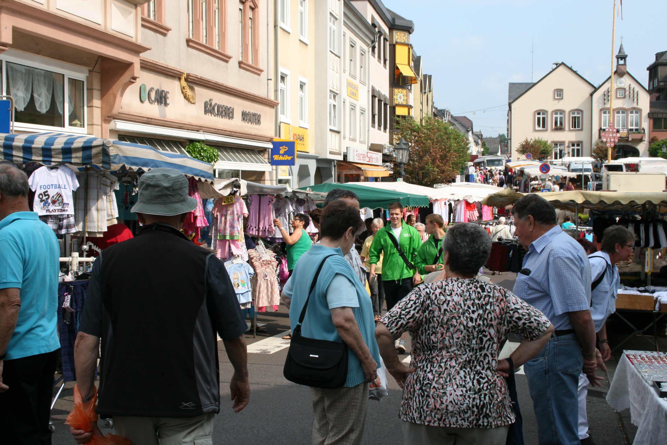 Strassenszene beim Monatsmarkt in der Stadt Wadern auf dem Marktplatz